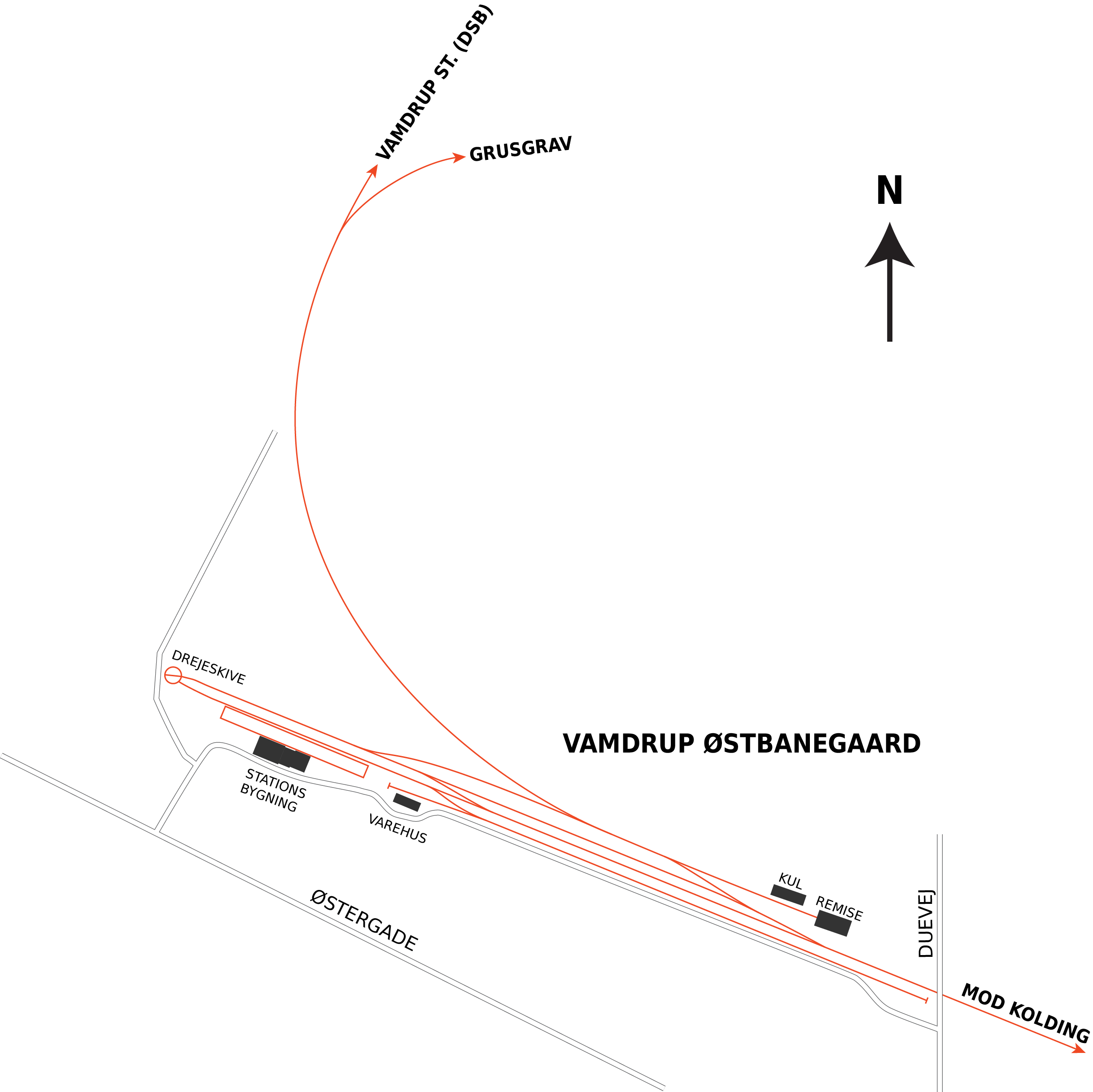 Oversigt over Vamdrup Østbanegårds banelinjer